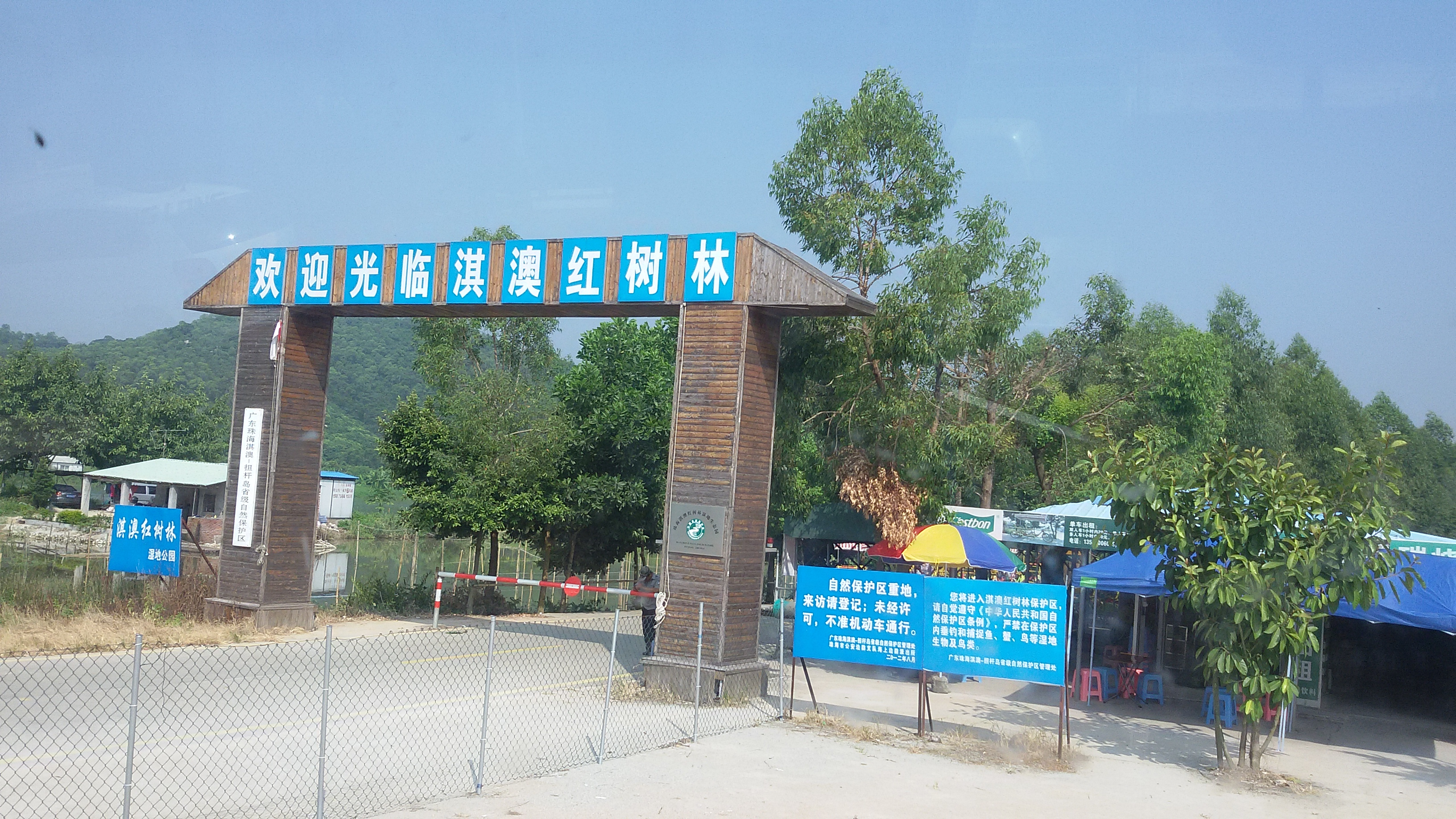 粵語: 珠海嘅淇澳紅樹林景區